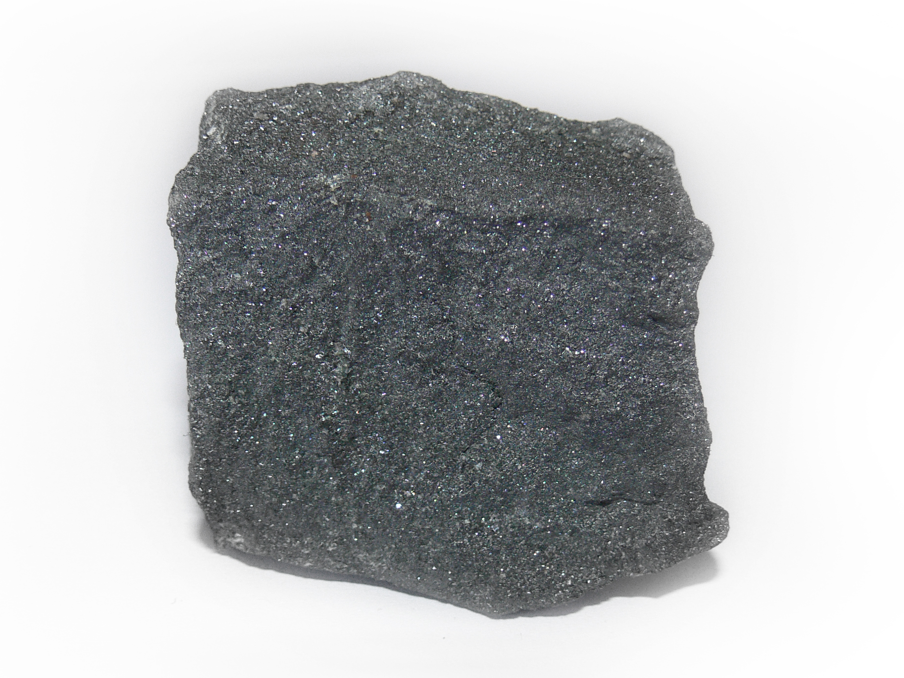 Magnetite is a ferrimagnetic mineral